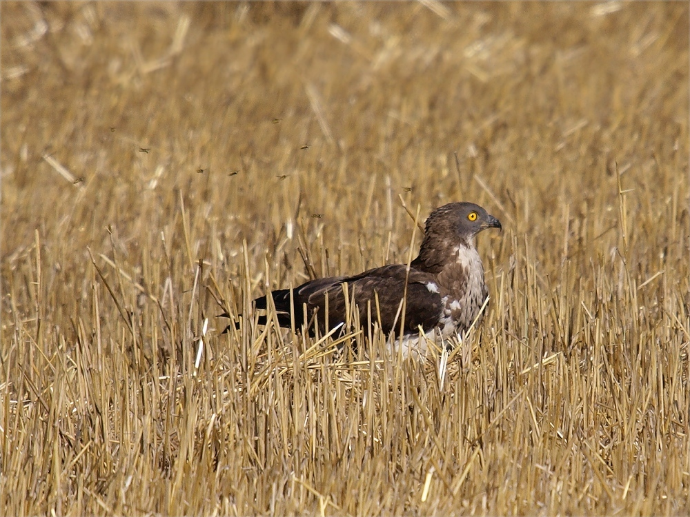 Wespenbussard beim Ausgraben eines Wespennests. Marchfeld, Österreich.